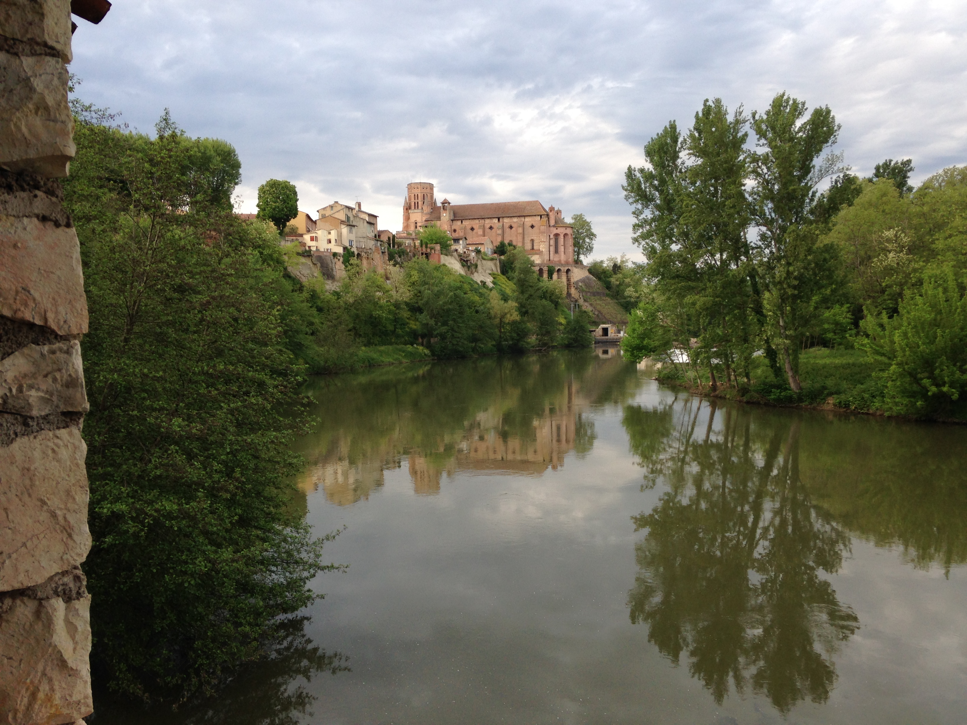 Cathédrale Saint-Alain de Lavaur, Tarn, France .